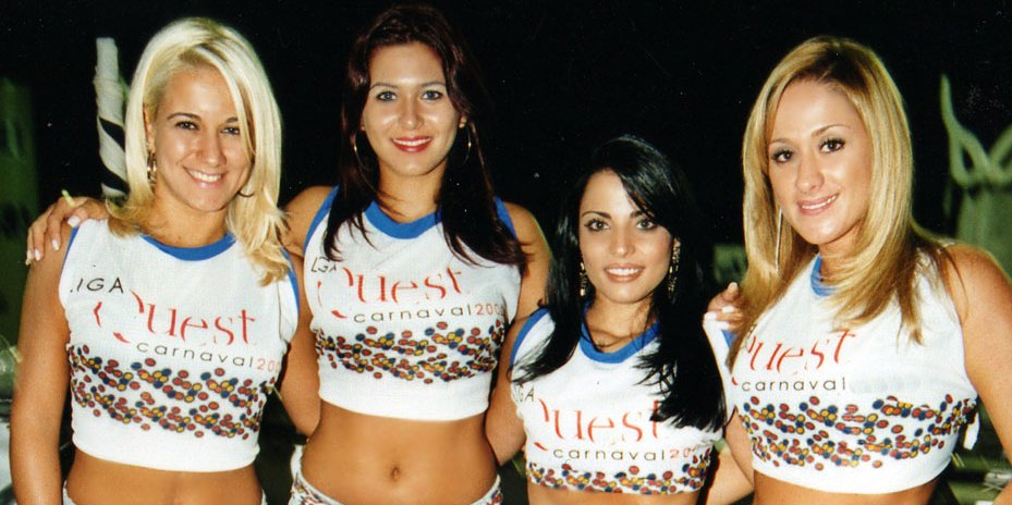 As Mallandrinhas do Sérgio Mallandro. Left to right: Fabiana Pieroccini, Lívia Andrade, Elaine Pinheiro and Sara de Oliveira.Mallandretes